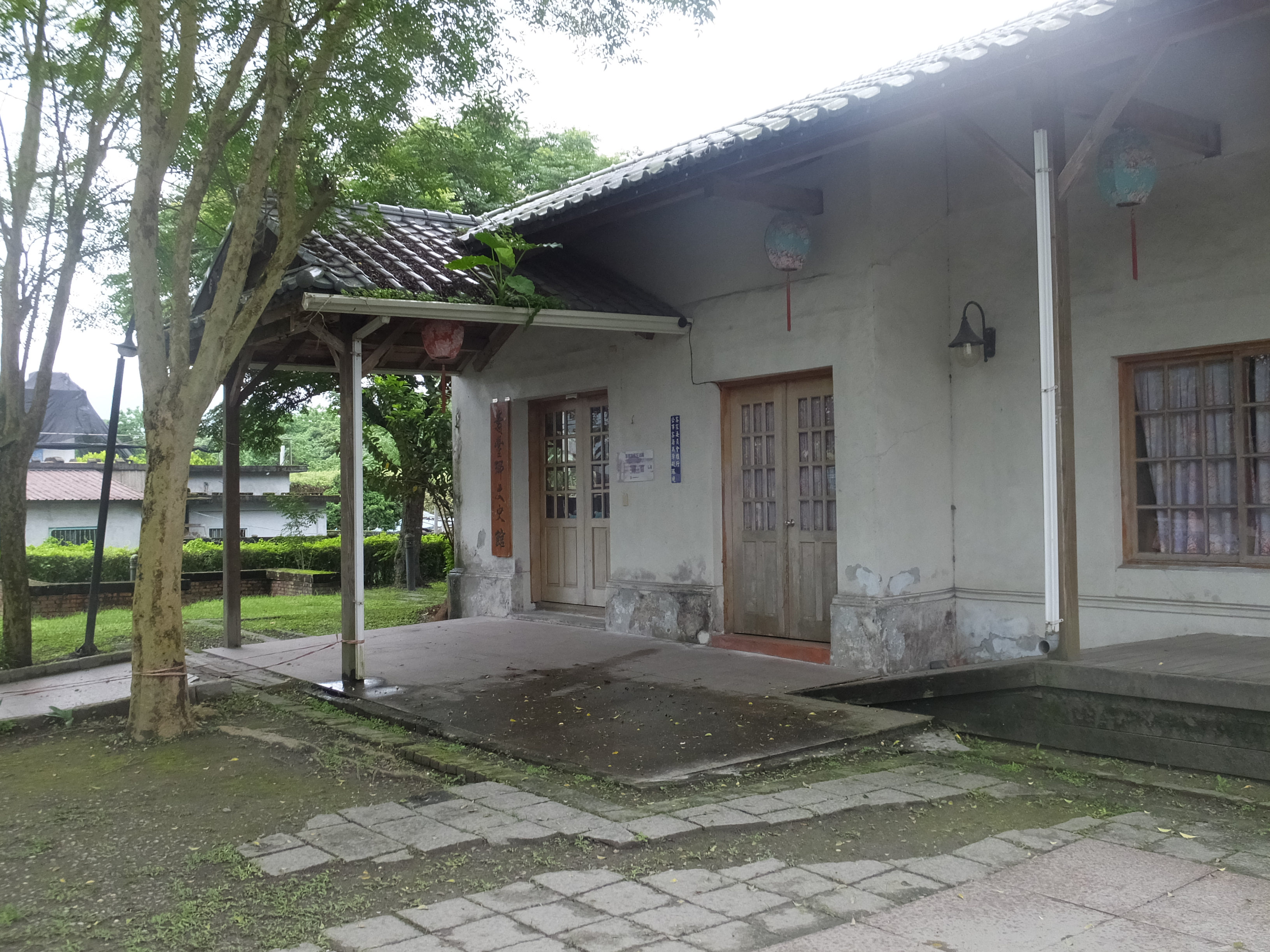 壽豐客家文物館 Shoufeng Hakka Culture Museum